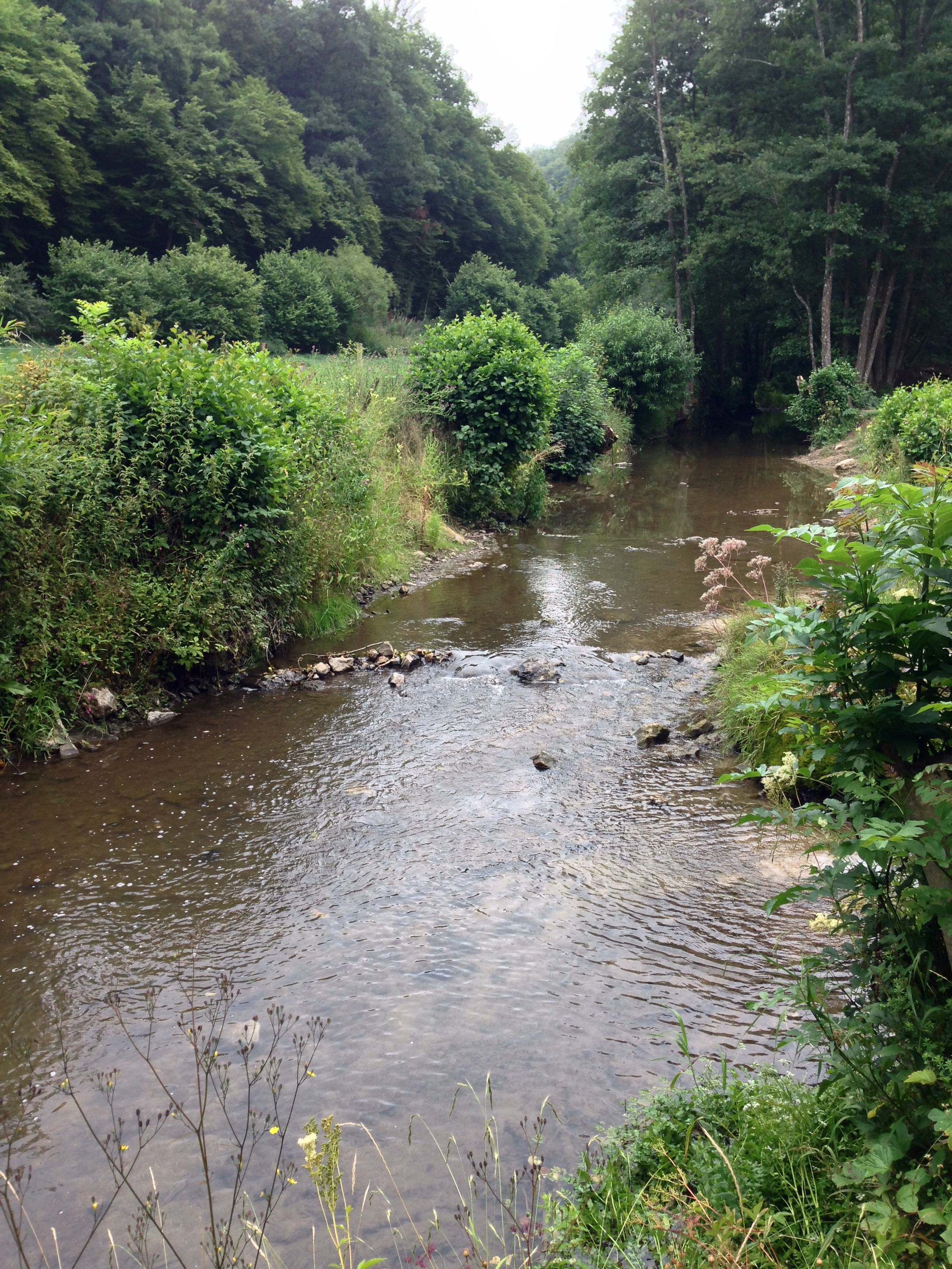 Ahbach nahe dem Dreimühlen-Wasserfall